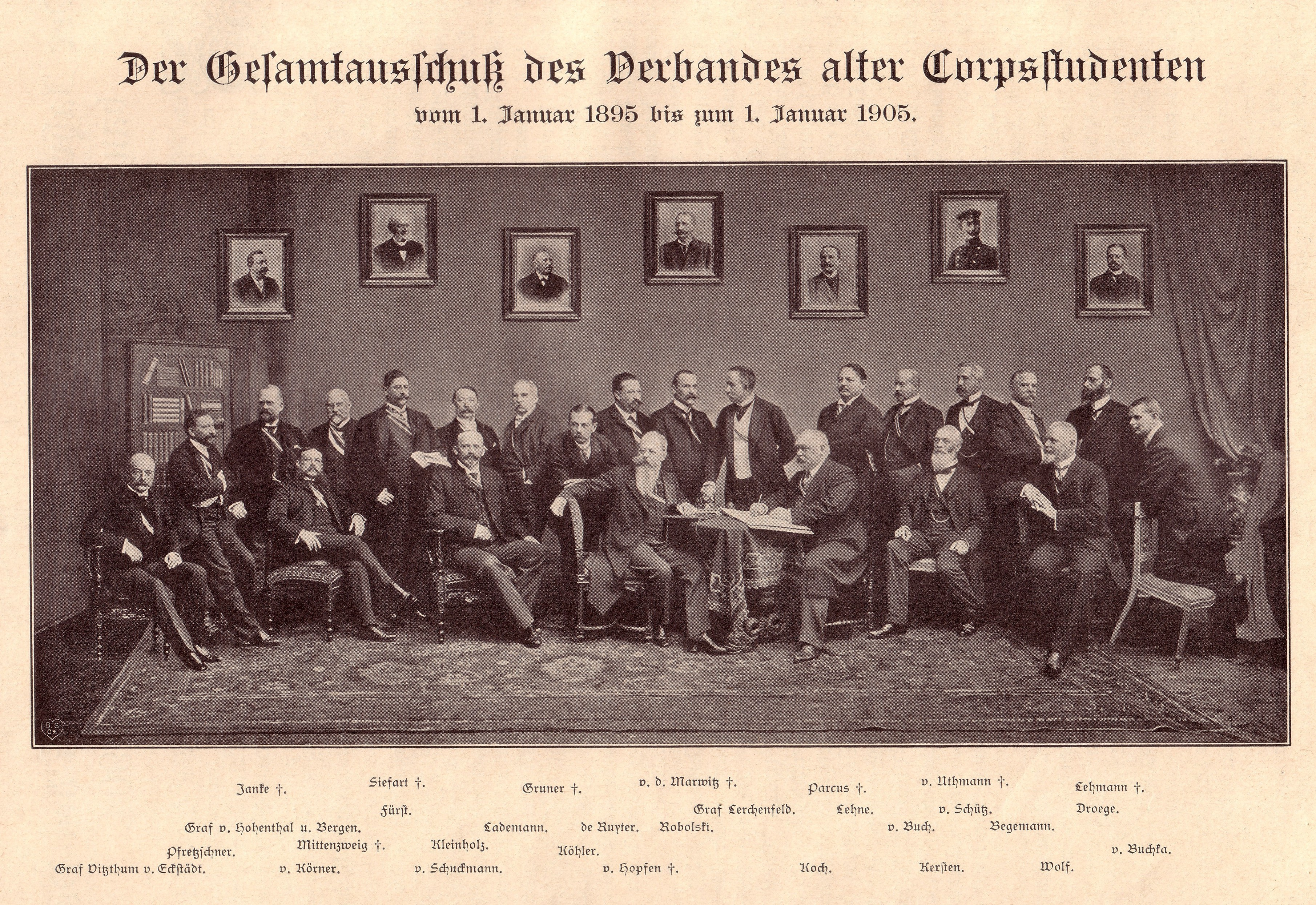 Gesamtausschuss des Verbandes Alter Corpsstudenten (Vorstand Berlin) seit dem 1. Januar 1895. Das Foto ist 1905 erschienen, als dieser Ausschuss bereits zurückgetreten war. Das Foto wurde allerdings früher angefertigt, möglicherweise 1895, und deswegen manche Mitglieder, die inzwischen gestorben sind mit dem † gekennzeichnet. Zu sehen sind darunter in alphabetischer Folge: Karl von Buchka , Hans von Hopfen, Gustav Janke (1849-1901), John Koch, Hugo von Lerchenfeld-Köfering], Norbert Pfretzschner, Heinrich Robolski, Otto Rudolf Vitzthum von Eckstädt? (bitte sukzessive ergänzen!)